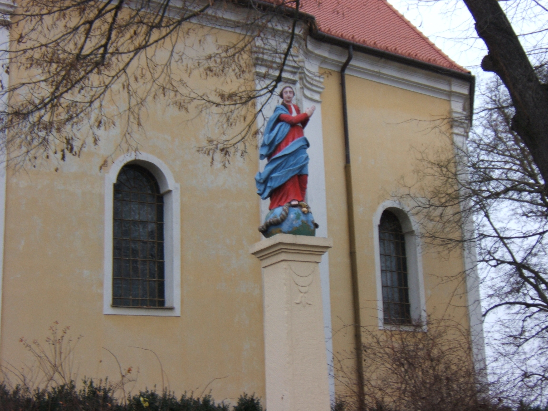 Mária-szobor, Gölle